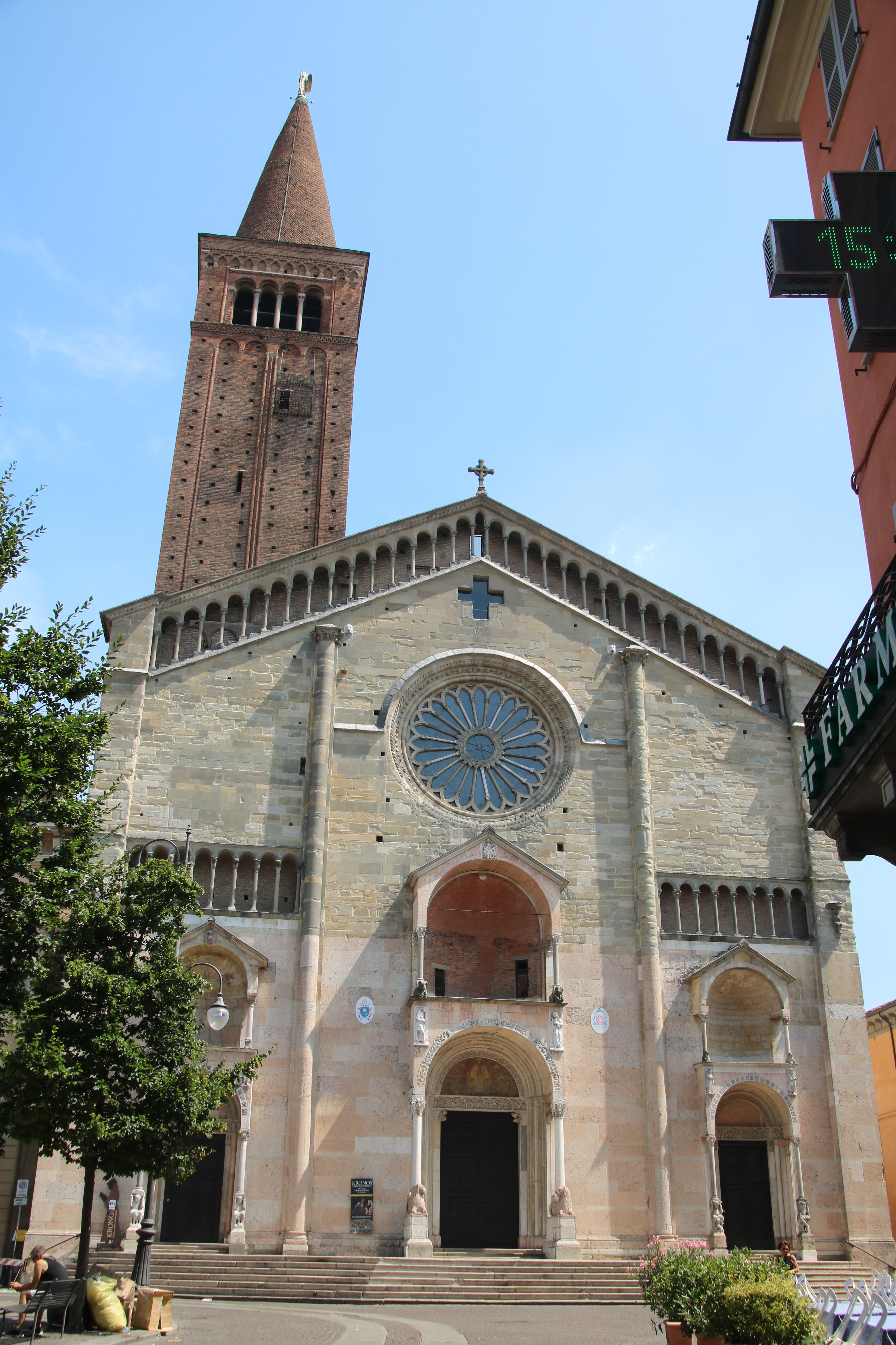 duomo di Piacenza This is a photo of a monument which is part of cultural heritage of Italy.